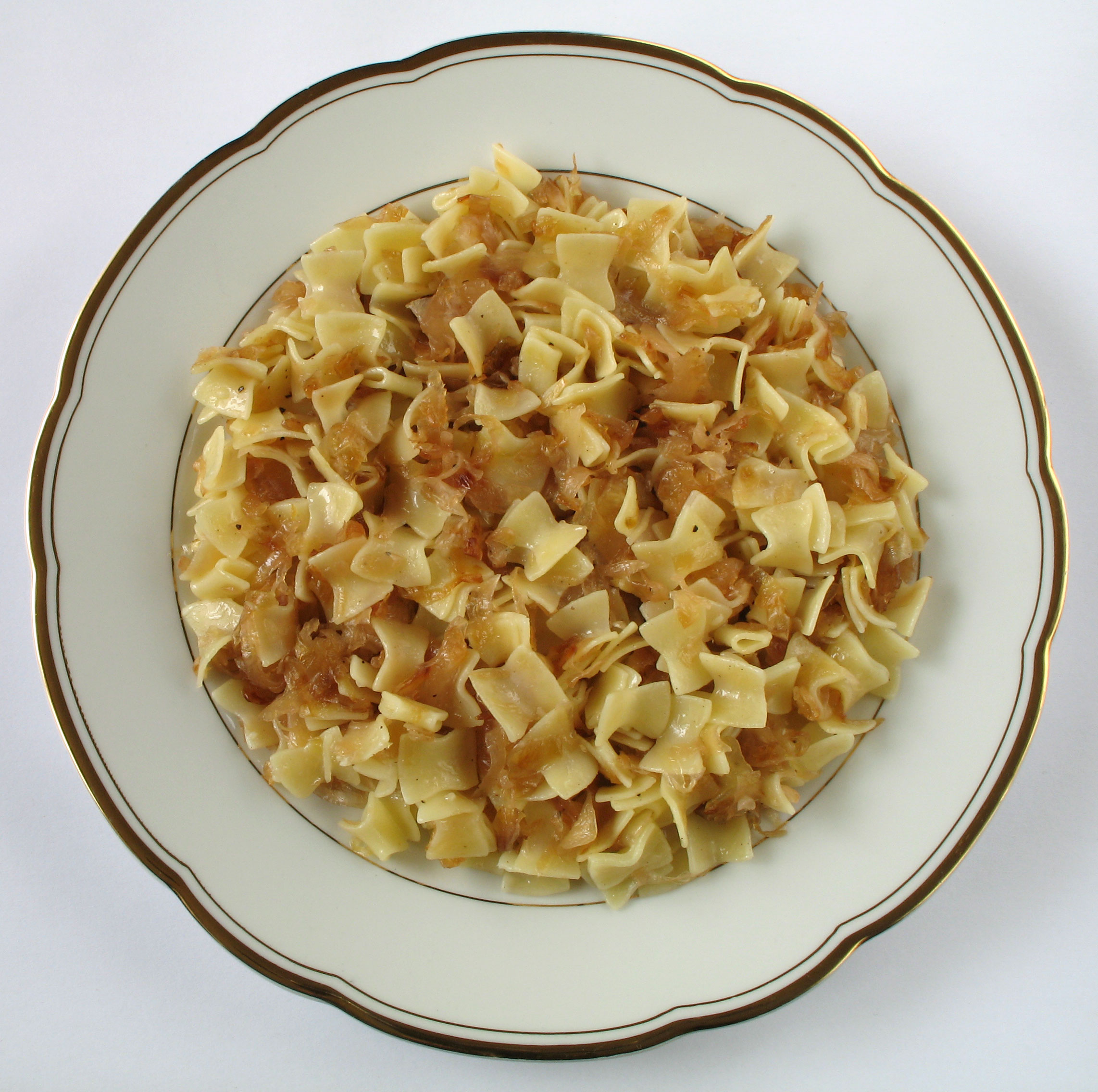 Krautfleckerl (Österreichische Spezialität)